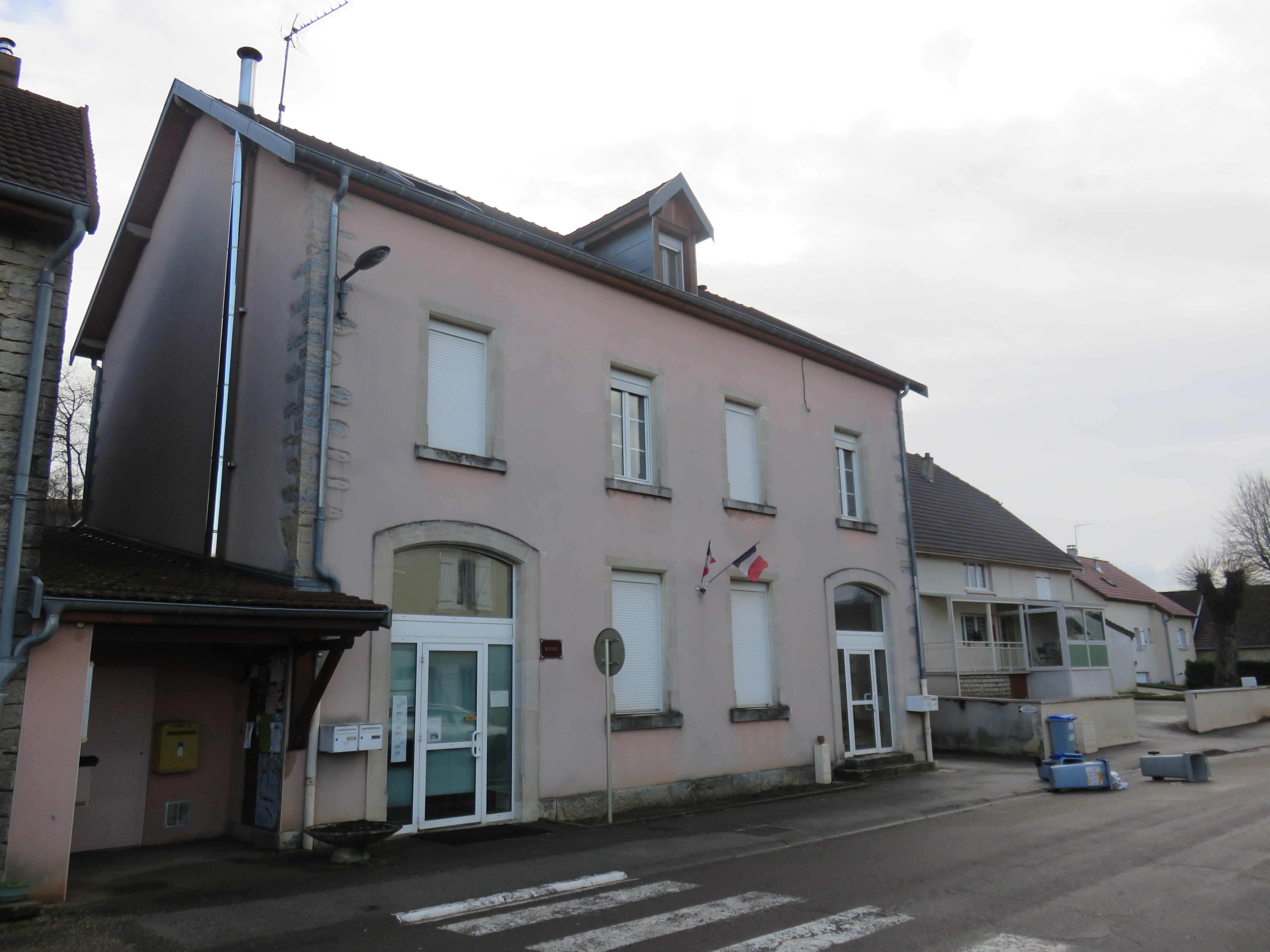 Saligney (Jura, France) en janvier 2018.